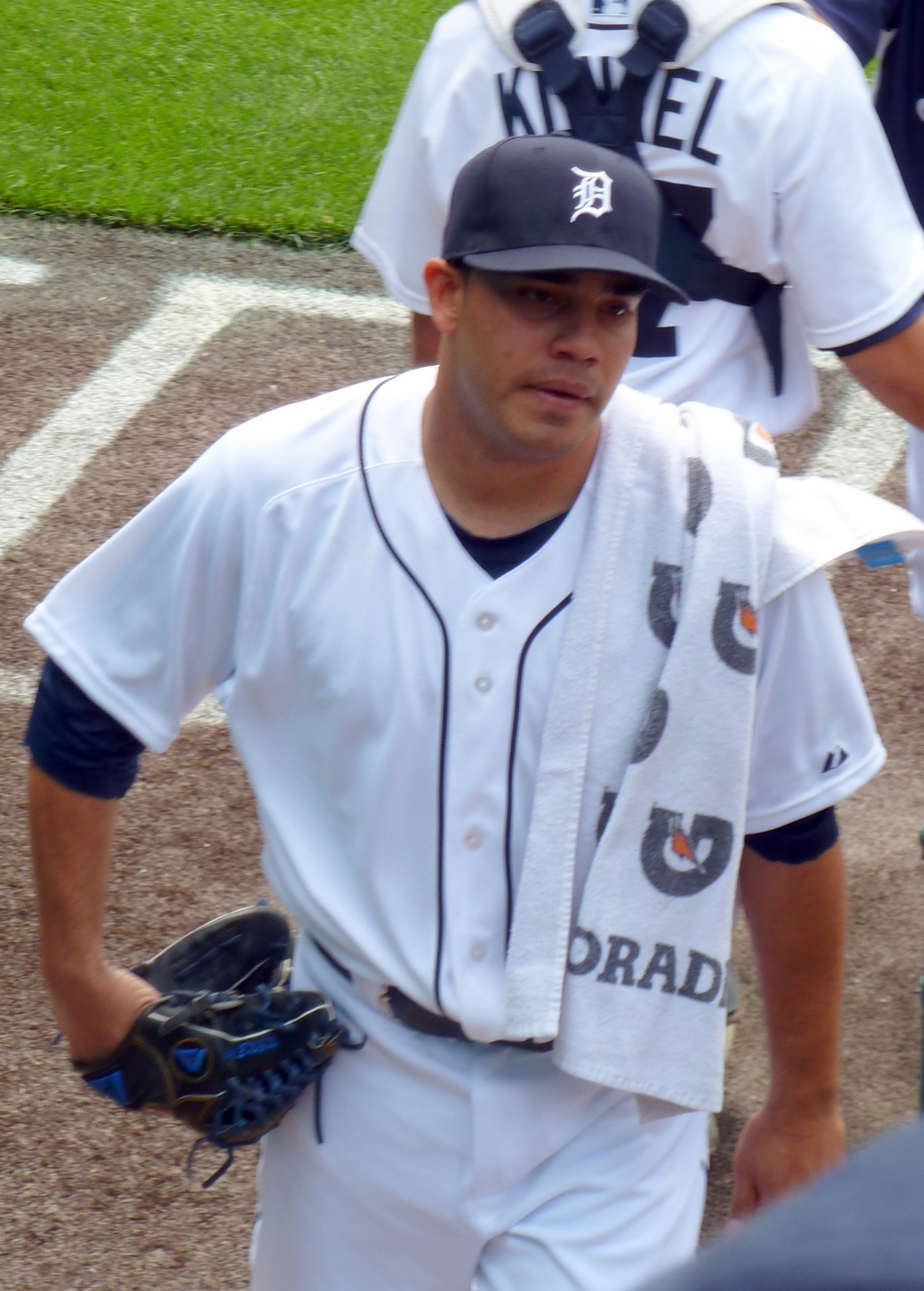 José Álvarez